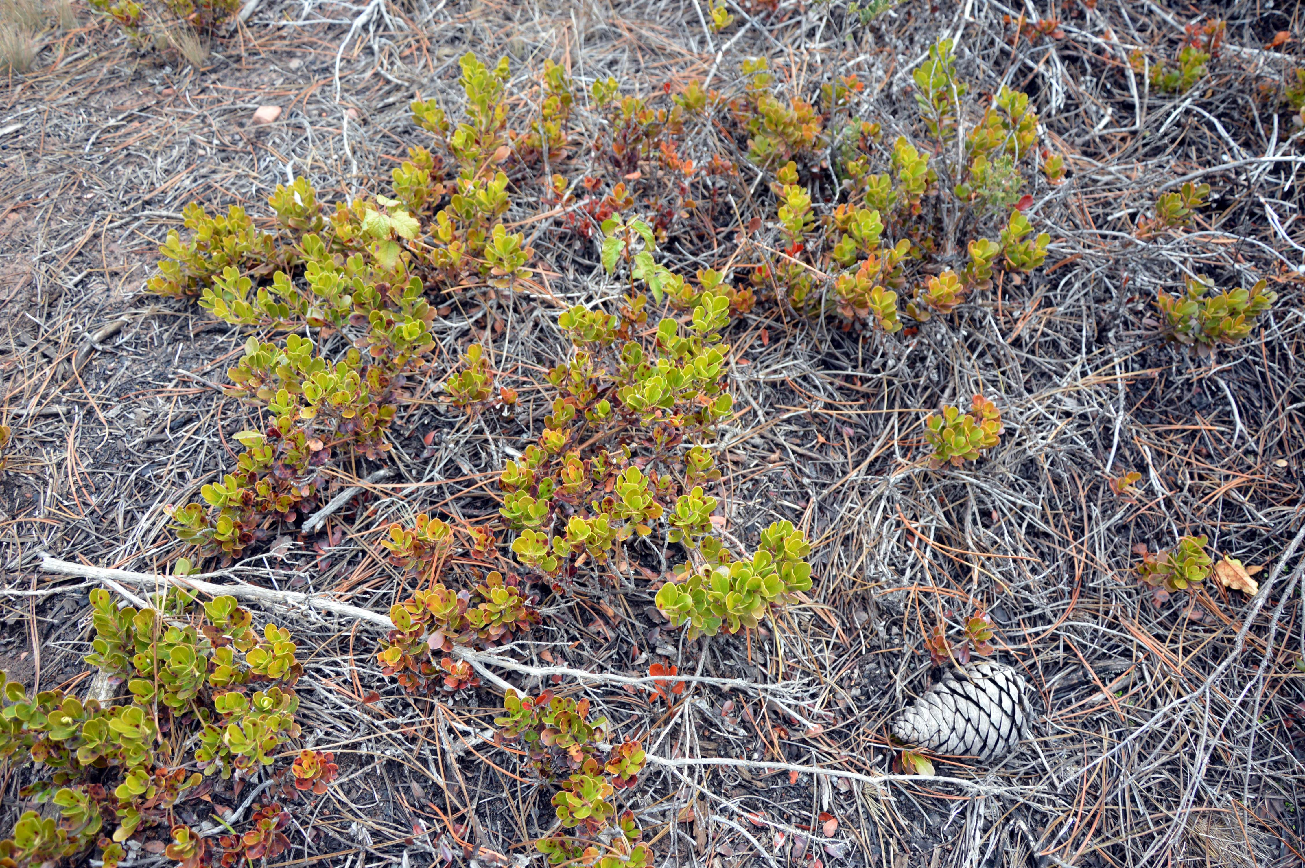 Detalle de gayuba en El Rodeno, Parque Cultural de Albarracín (2018).